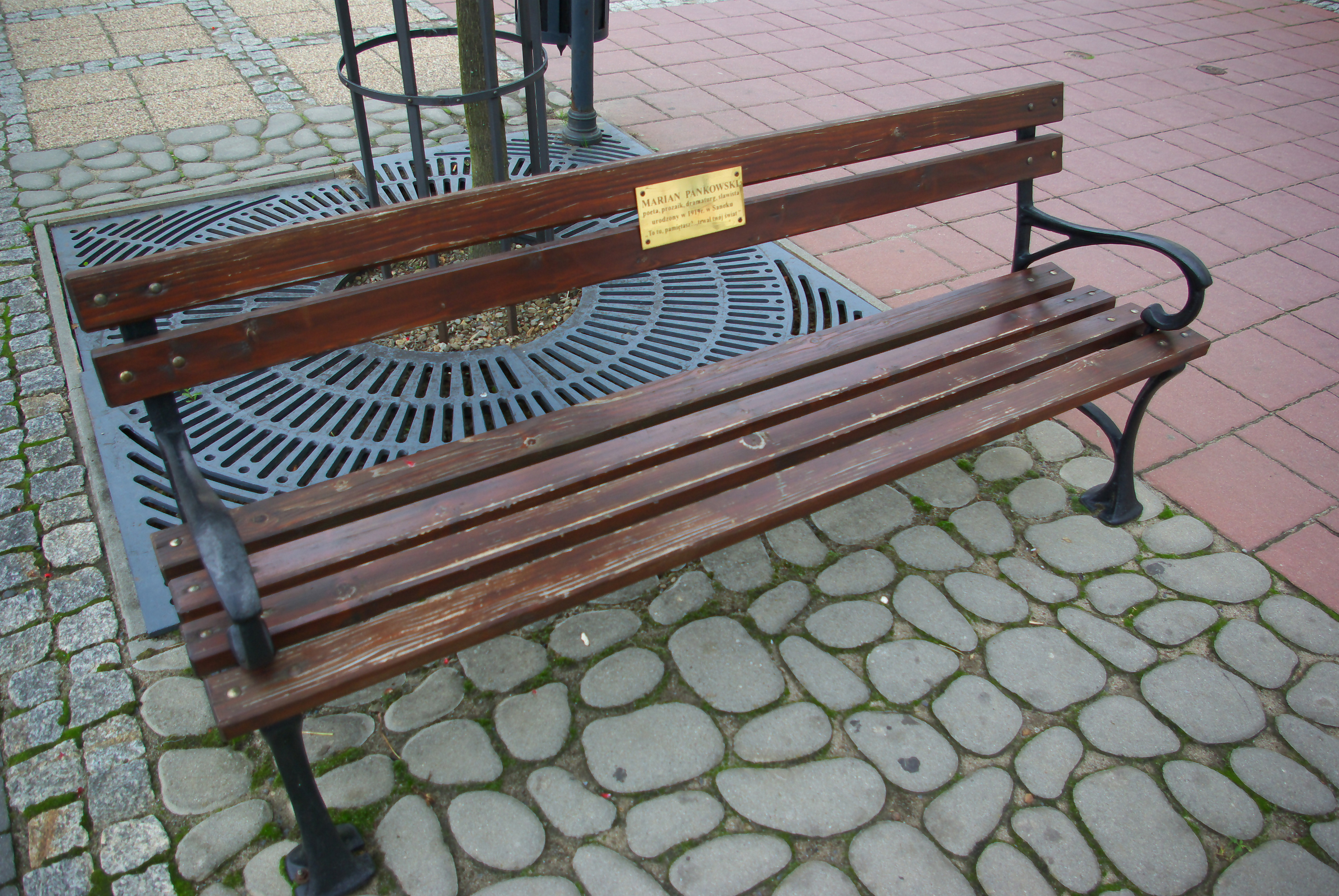 Ławka upamiętniająca Mariana Pankowskiego na Rynku w Sanoku.